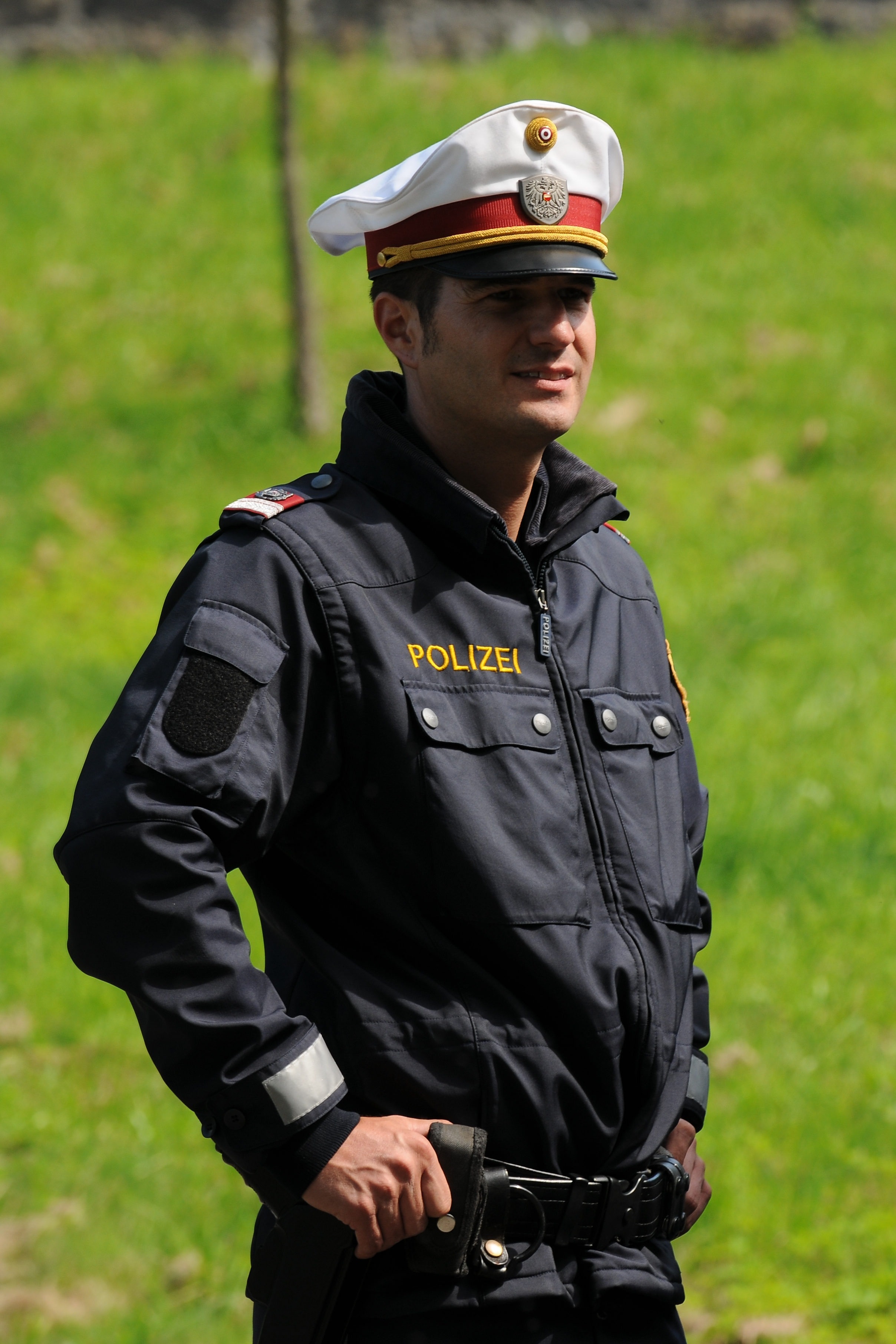 Ein Beamter der österreichischen Bundespolizei.